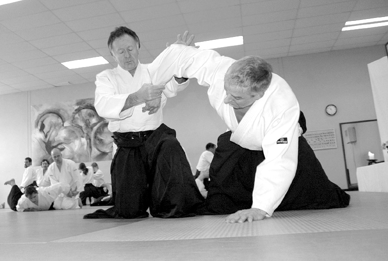 Gérard Blaize mit Dirk Becker beim Training in Palma de Mallorca, März 2006